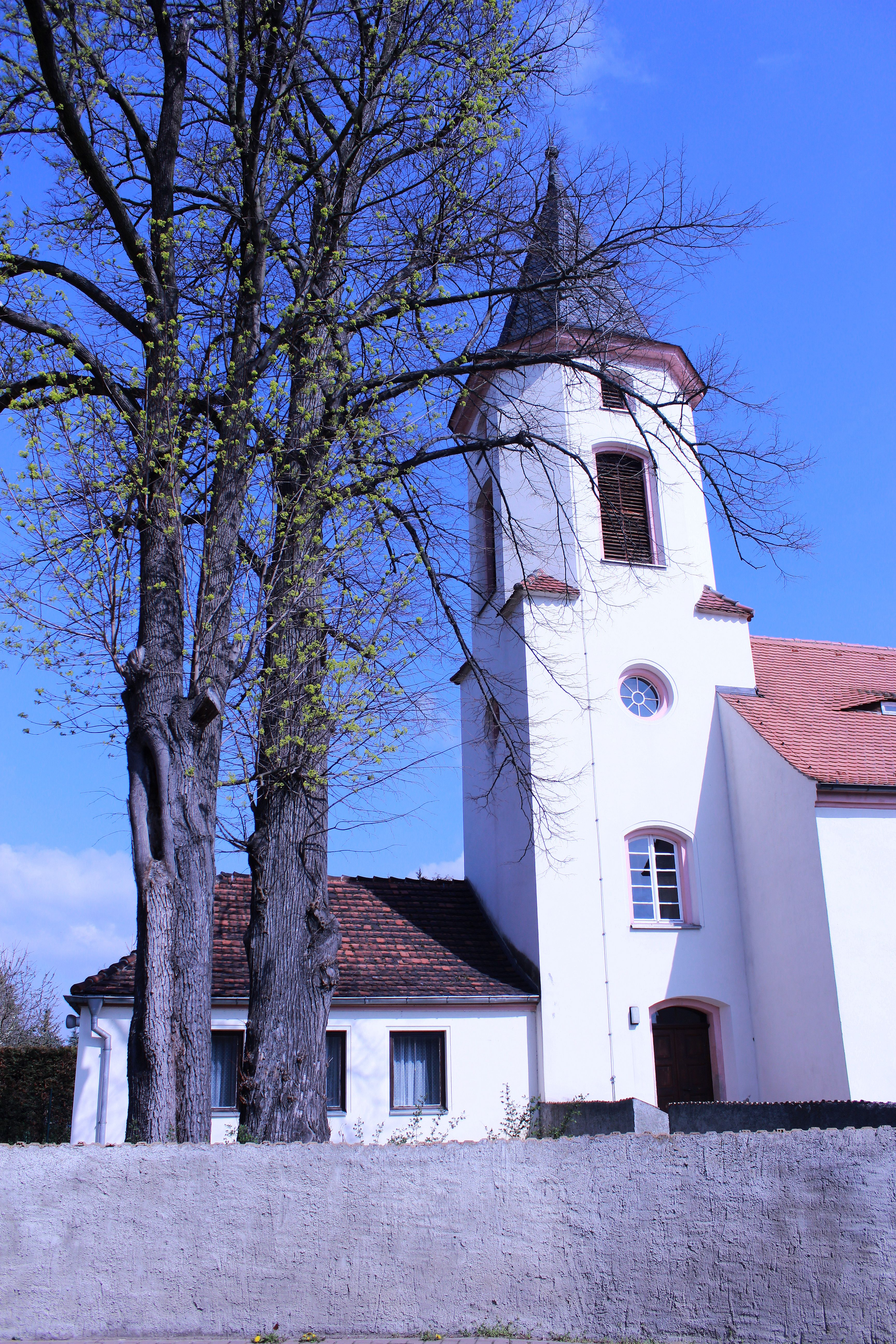 Koselitz.